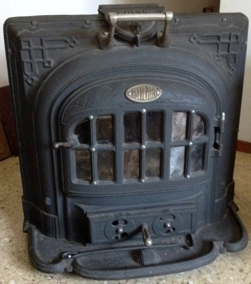 Estufa Salamandra inventada en 1742 por Benjamin Franklin.